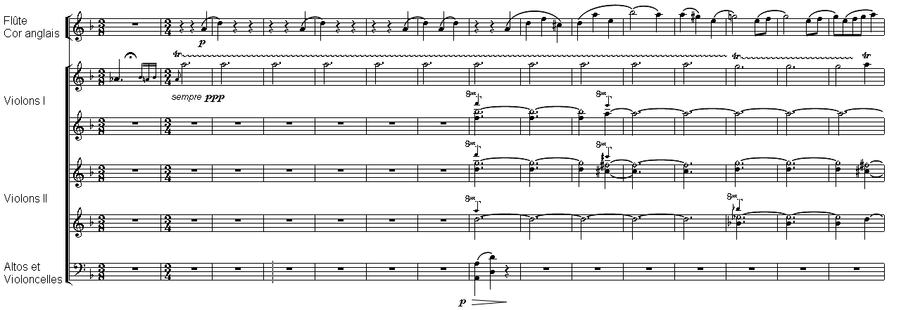 Berlioz - harmoniques de violons, scherzo de la reine Mab